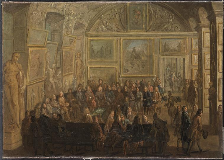 L'Académie royale de Peinture et de Sculpture, logée au Louvre dès 1692, occupe cette salle de 1712 à 1721. Décor en trompe l'oeil de Grimaldi Il Bolognese disparu en 1799.